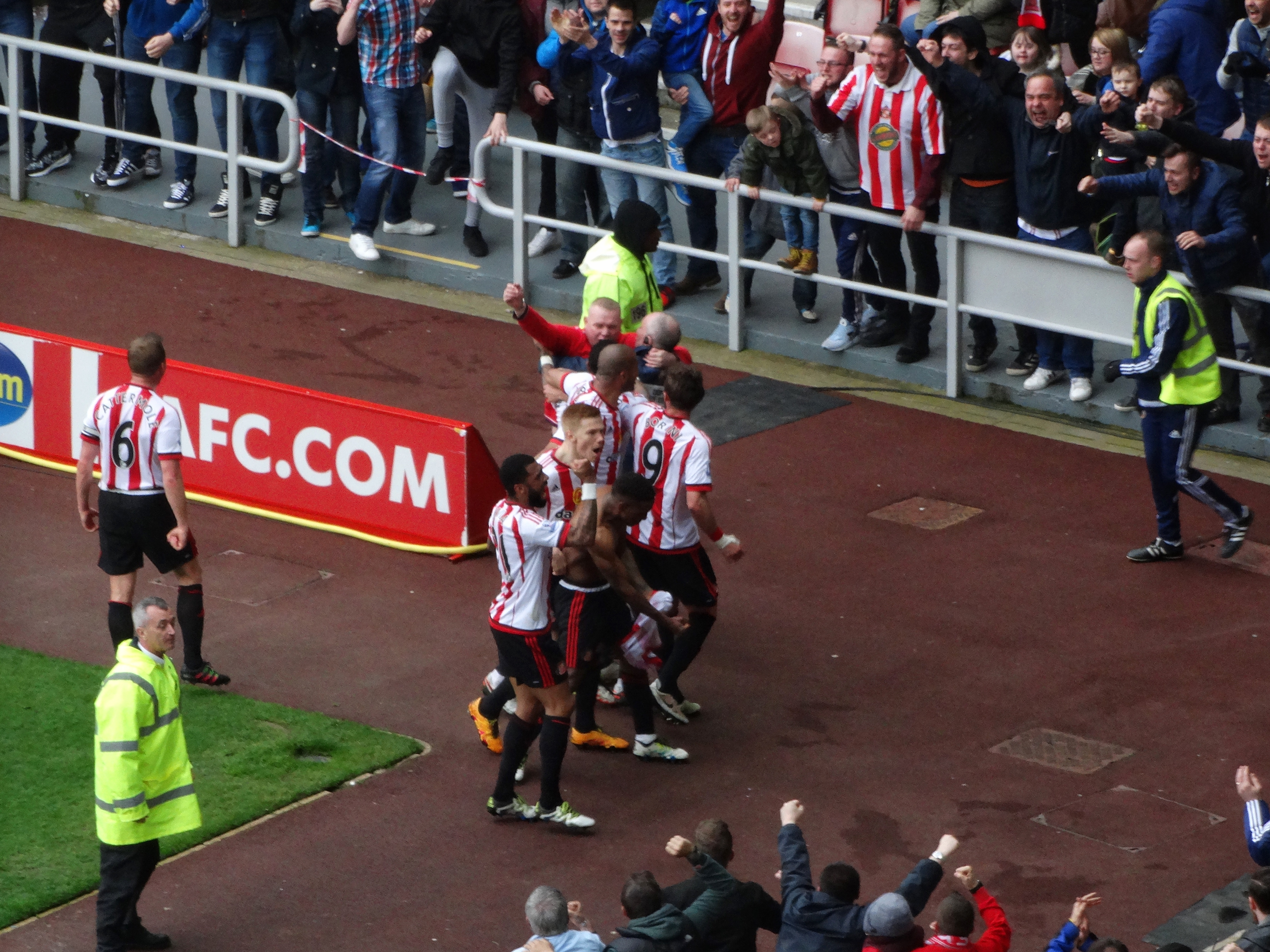 Sunderland 3 Chelsea2